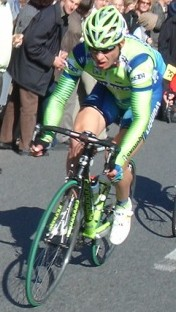 Aleksandr Kuschynski, Ronde van Vlaanderen 2007.